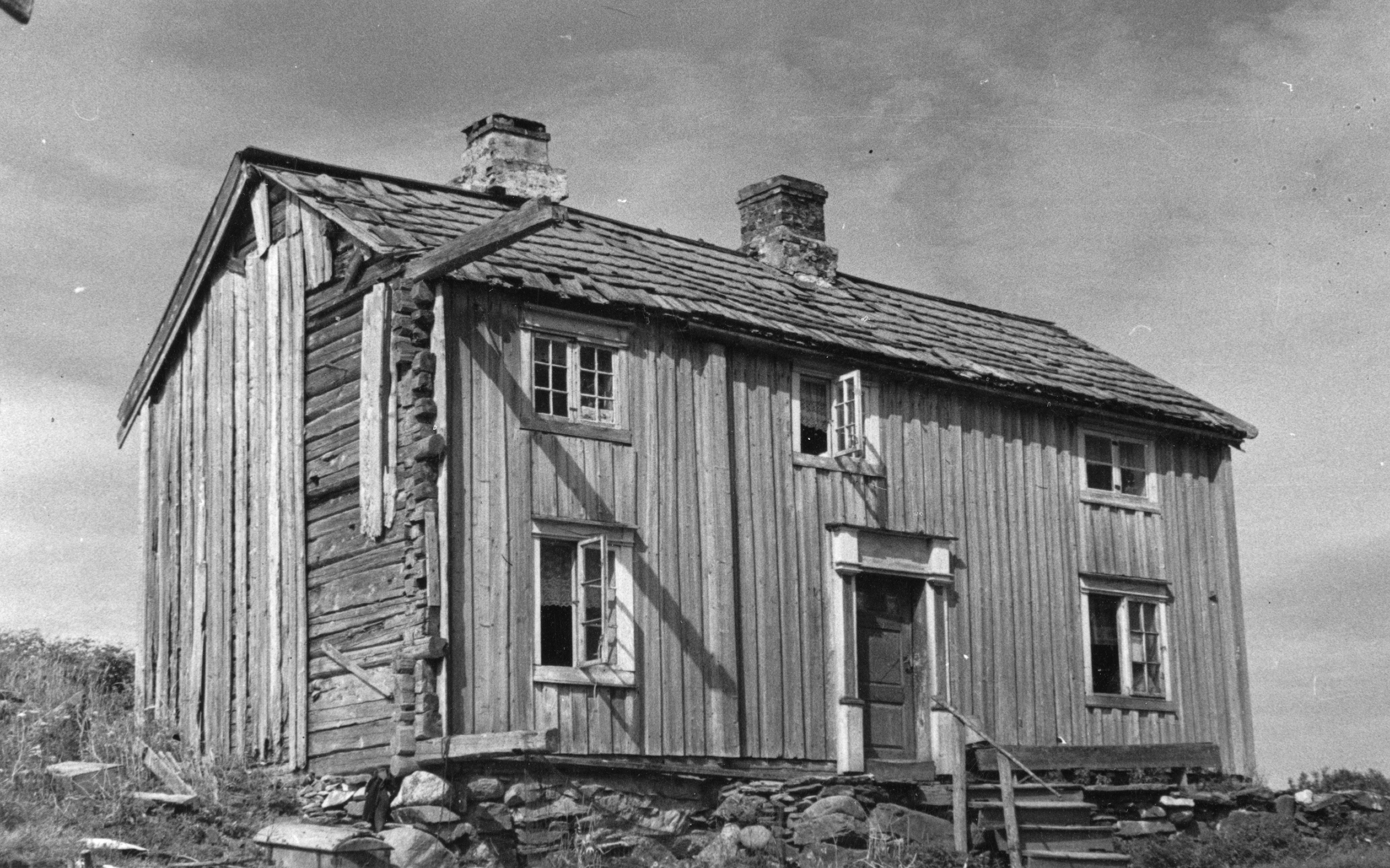 Steinvikholm i Skatval, Nord-Trøndelag Vaktstua This image on crowdsourcing geotagging platform Fotodugnad